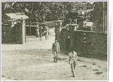 行政專校時期老照片